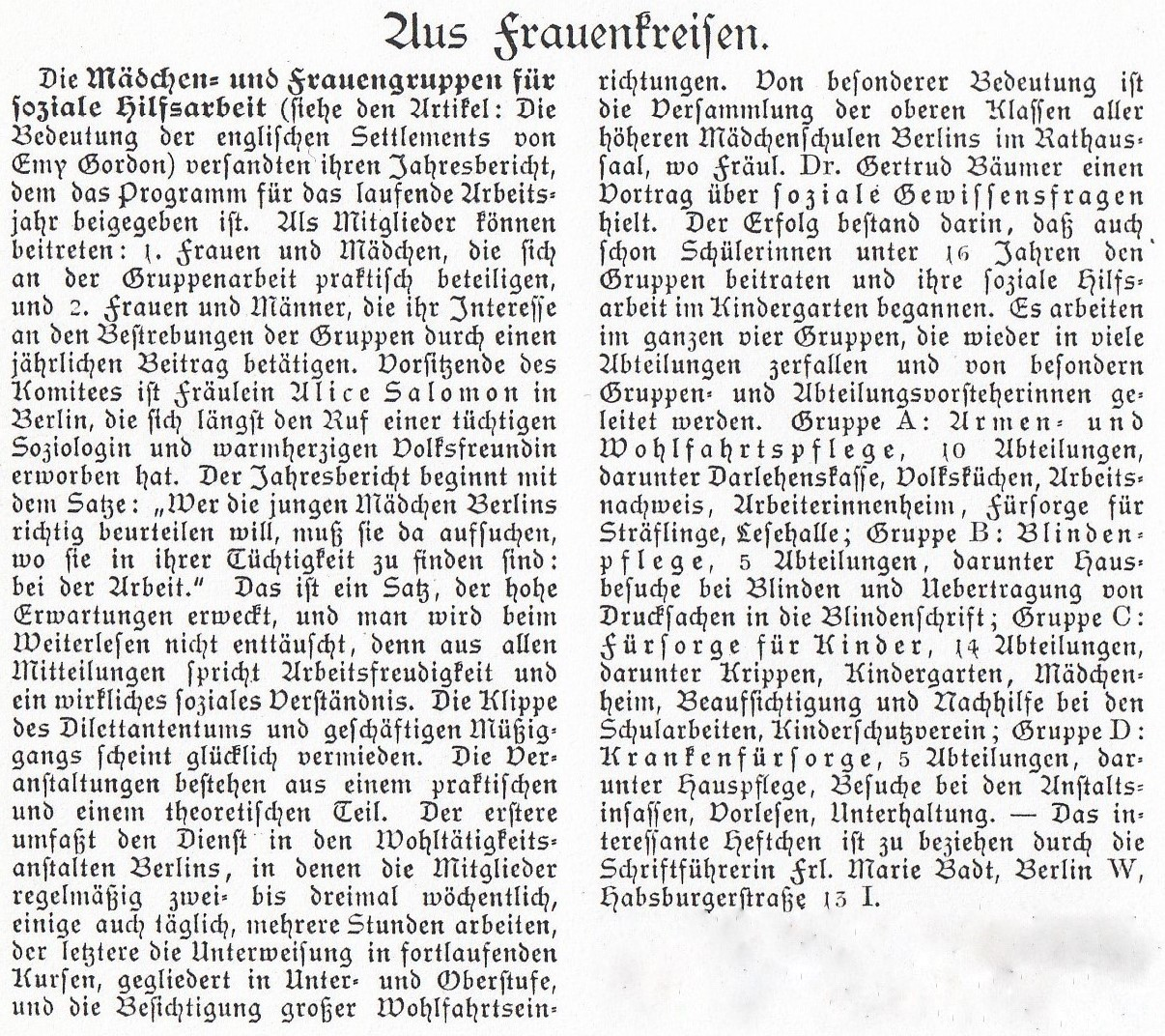 Kursankündigung der Mädchen- und Frauengruppe für soziale Hilfsarbeit